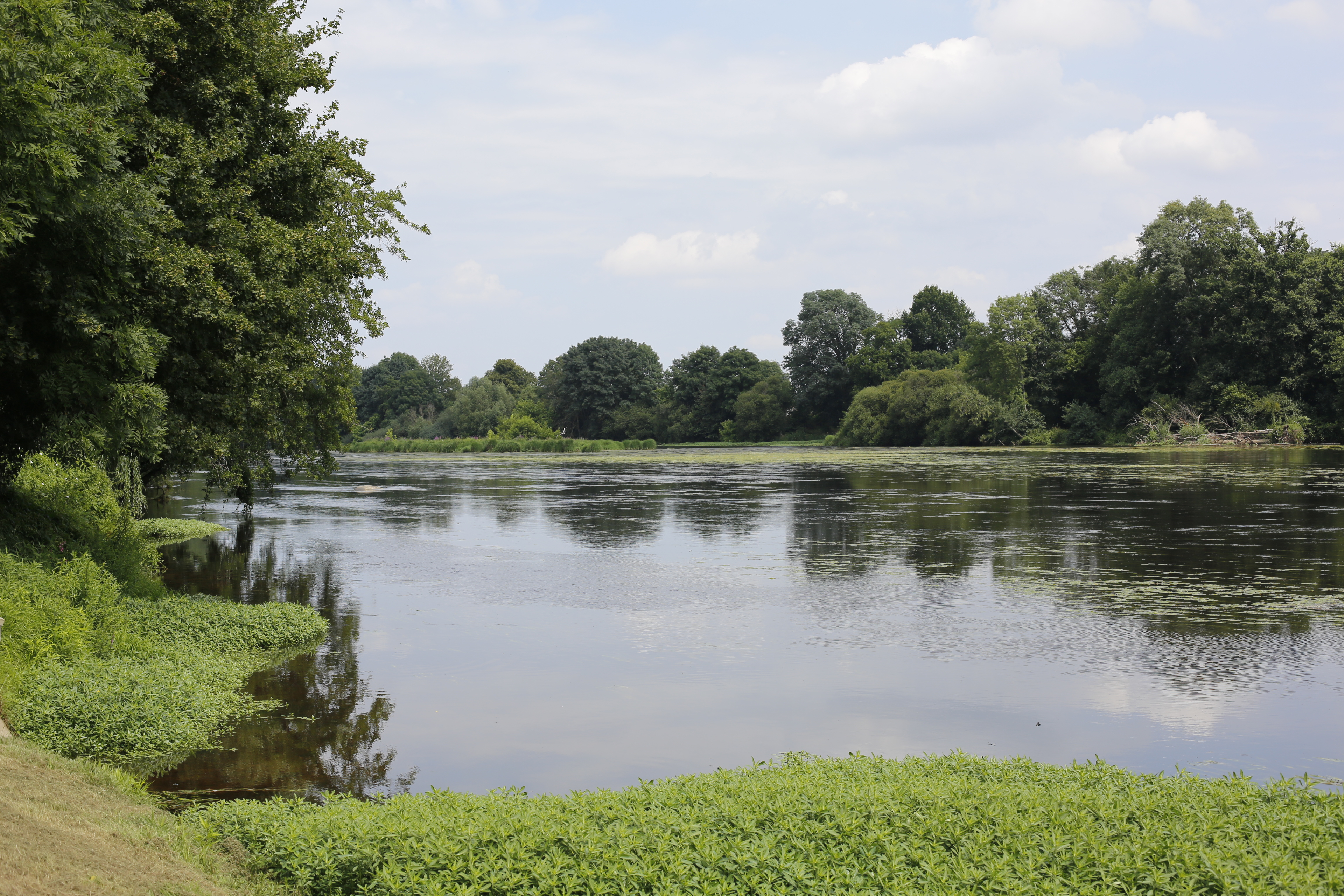 Les bords de la Vienne à Queaux.